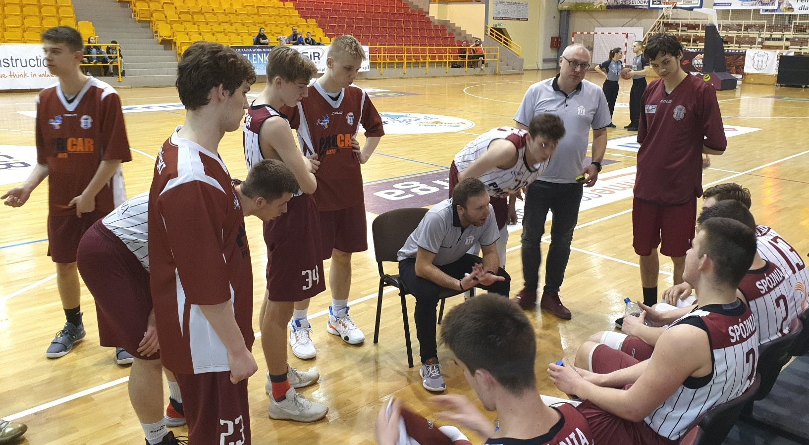 Stargard. Juniorzy Spójni